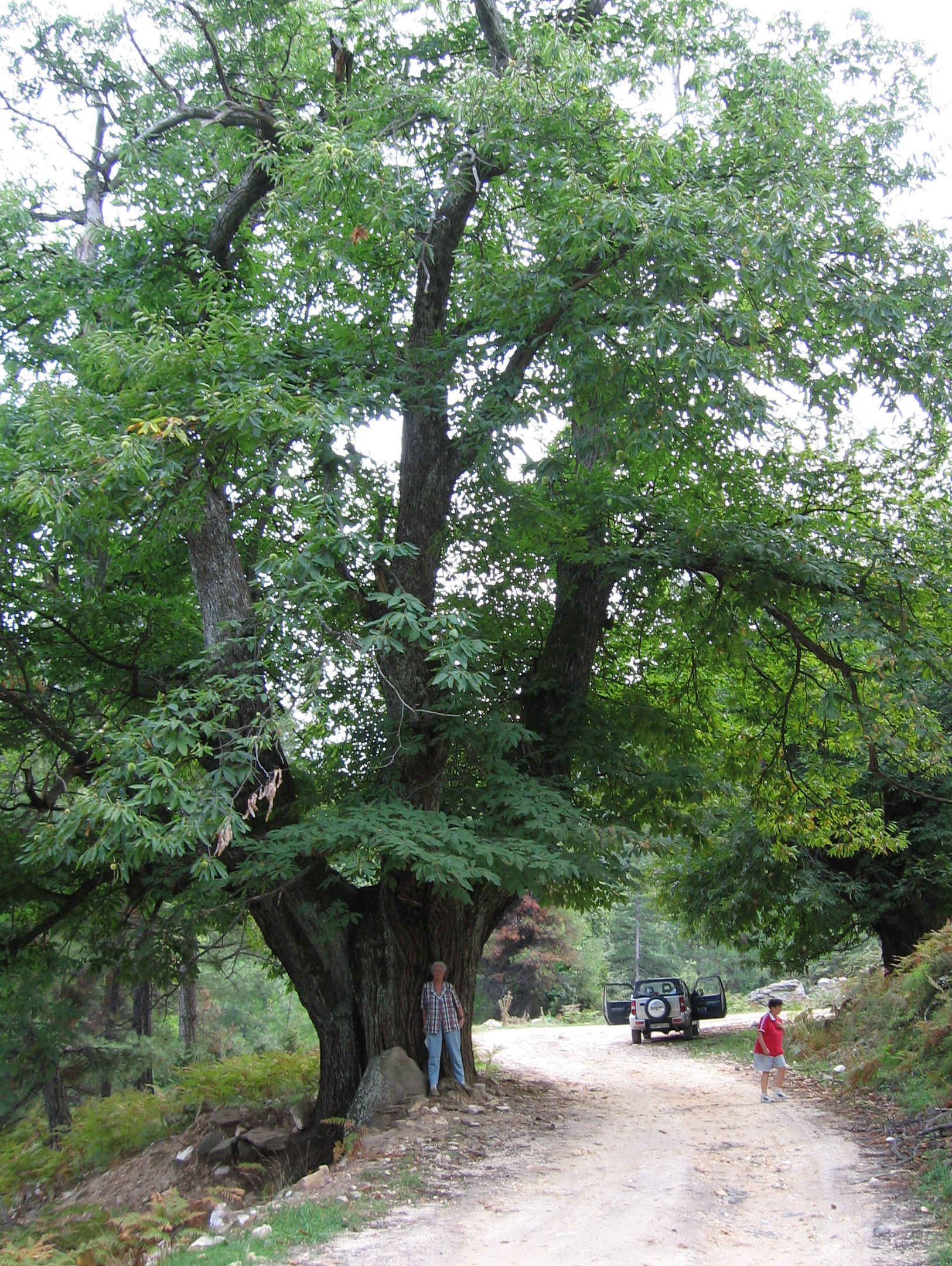 Edelkastania über dem Ort Panagia